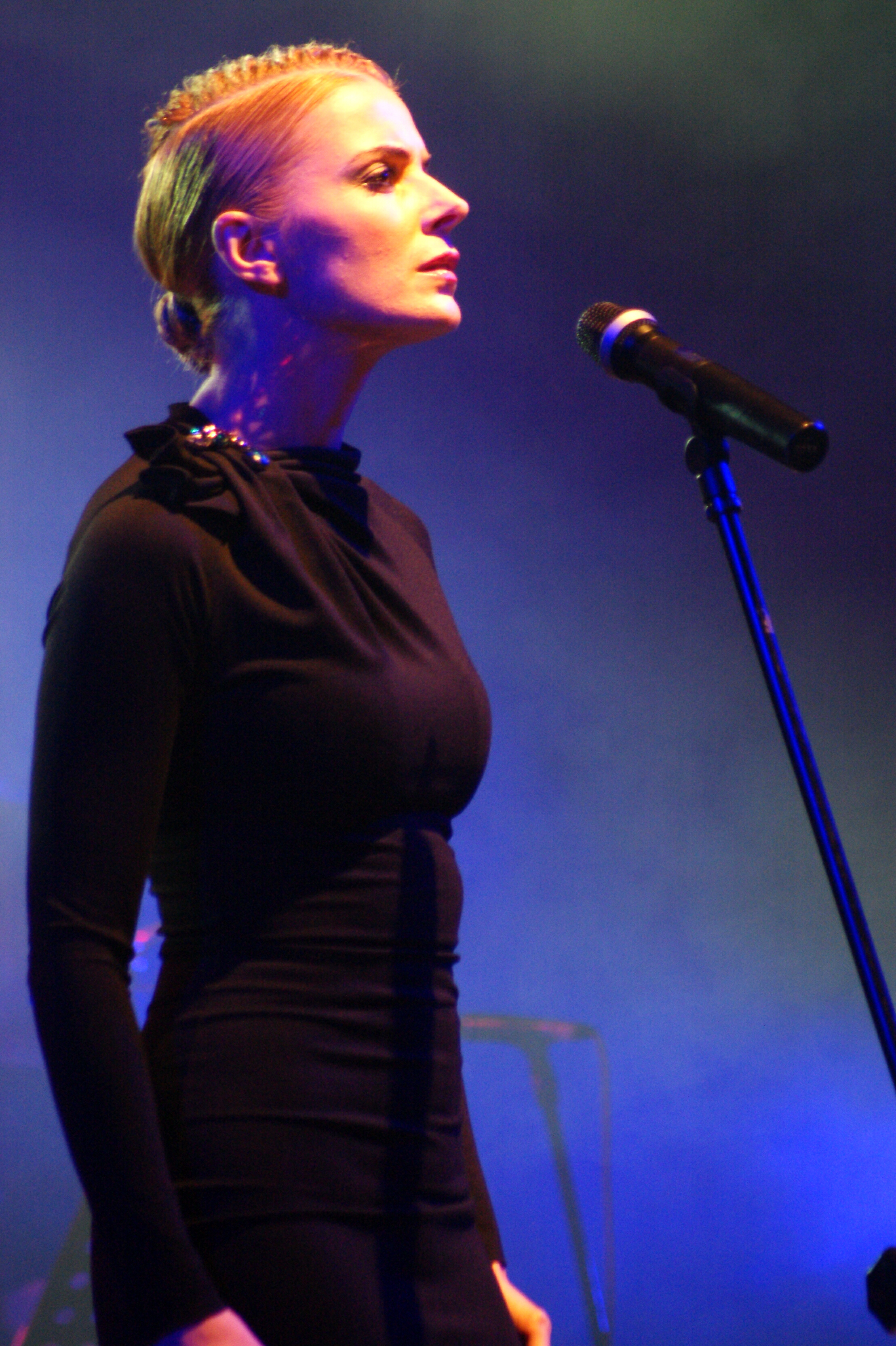 Halina Mlynkova podczas koncertu, 13 września 2013